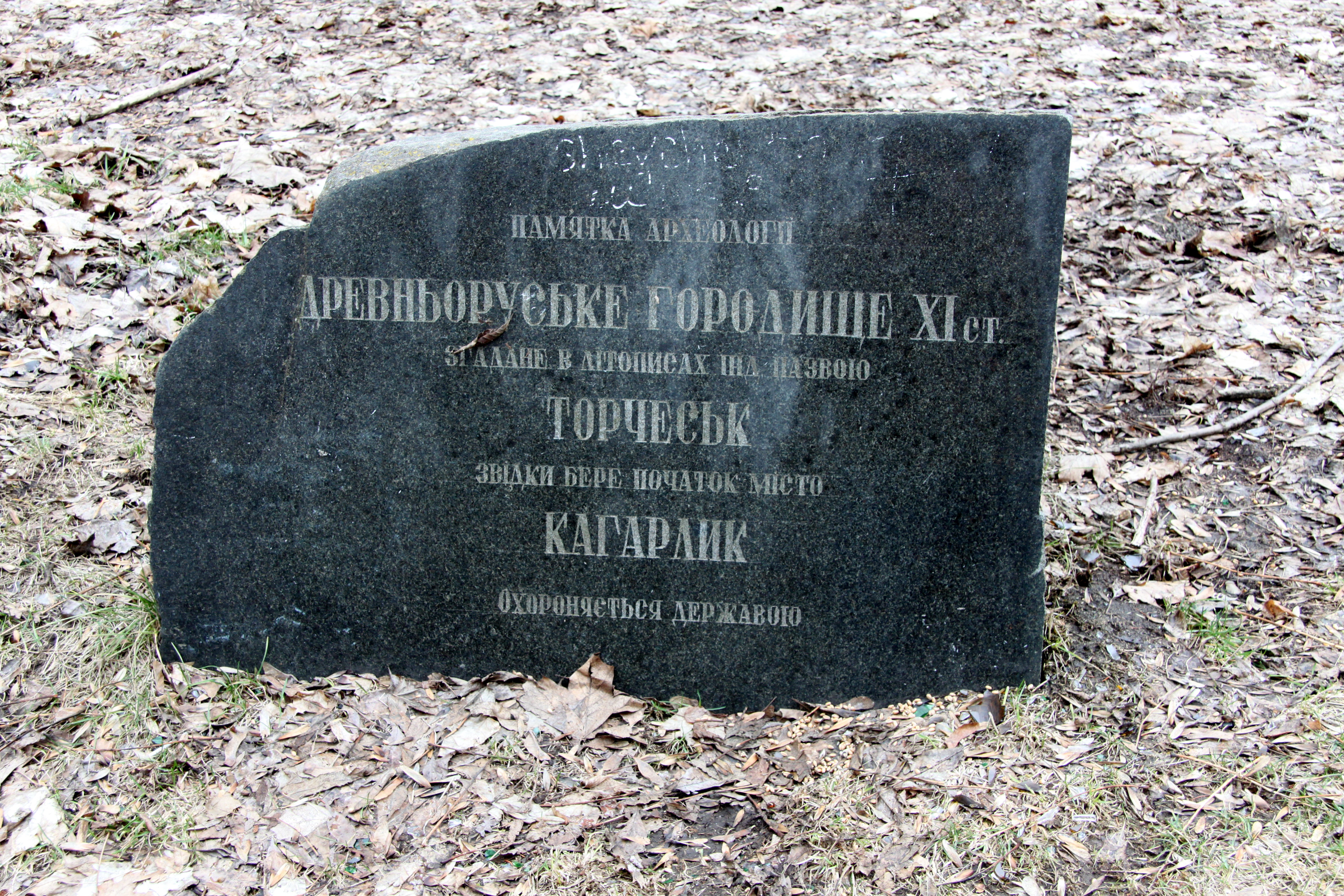 Парк-пам'ятка садово-паркового мистецтва загальнодержавного значення Кагарлицький, вул. Воровського, Кагарлик